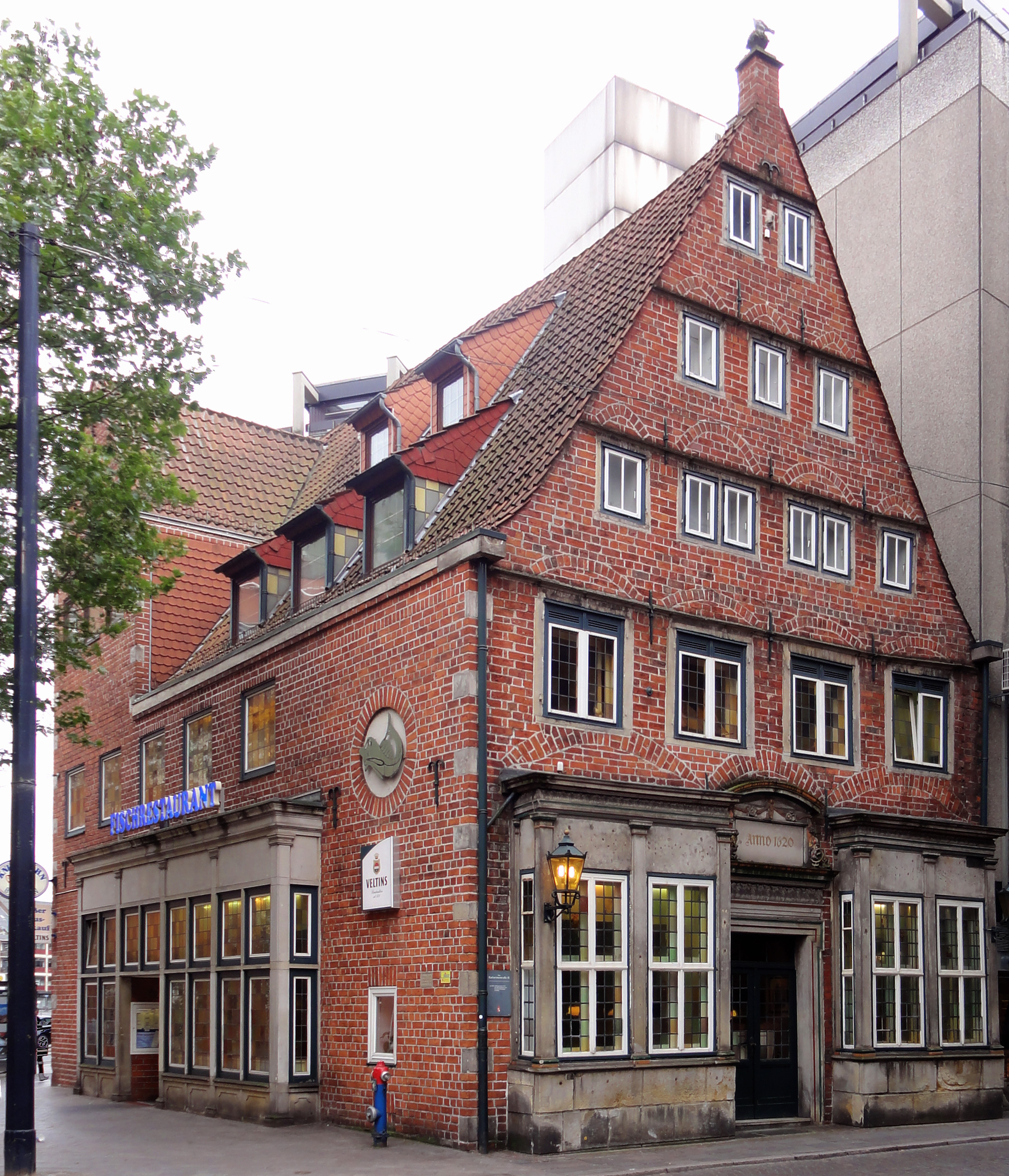 Fischrestaurant Knurrhahn, Restauration und Bierhalle H. Beckröge in Bremen, Katharinenstraße 15Das abgebildete Objekt ist ein geschütztes Kulturdenkmal in der Freien Hansestadt Bremen, mit der Nr. 0643 beim Landesamt für Denkmalpflege registriert.